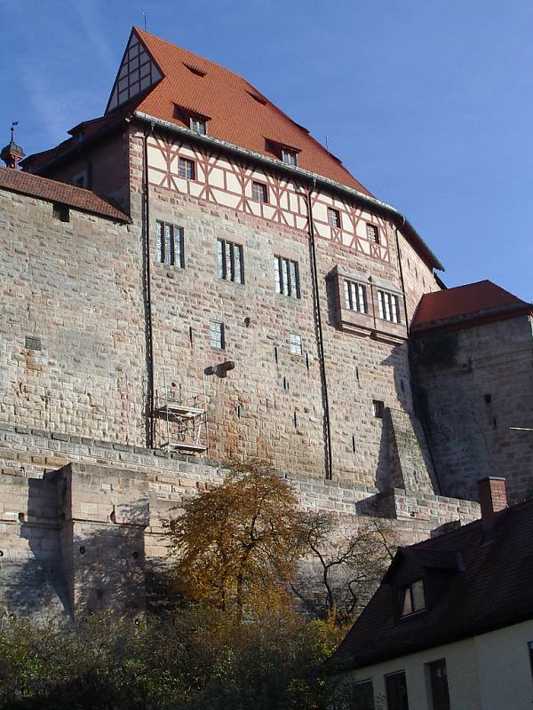 Cadolzburg, Burg, Westansicht mit Mauern in gesamter Höhe, von W (um 2003-11-09)